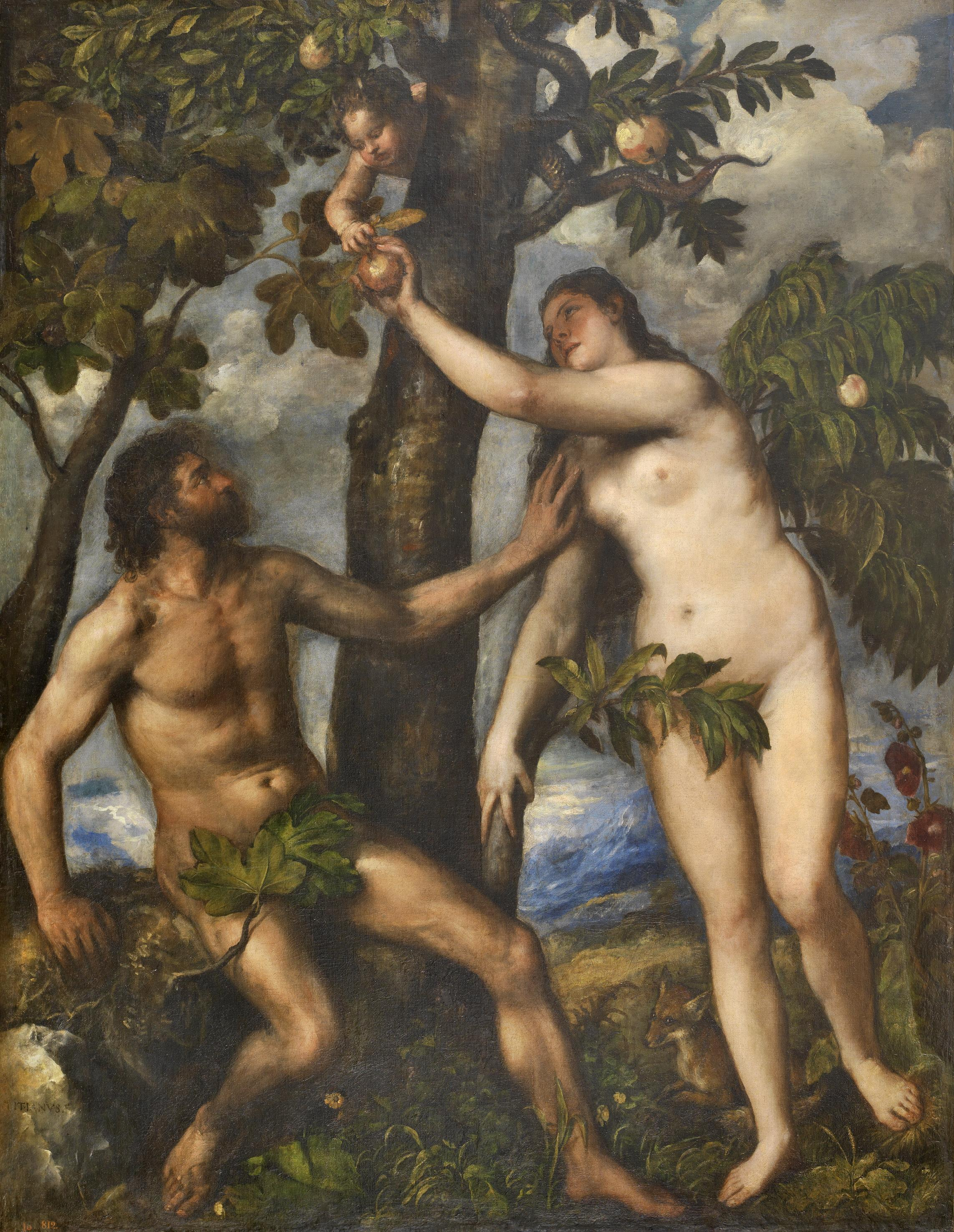 La obra representa a Adán y Eva en el Jardín del Edén y a la primera de ellos cogiendo del árbol el fruto prohibido que Dios les había ordenado no comer.